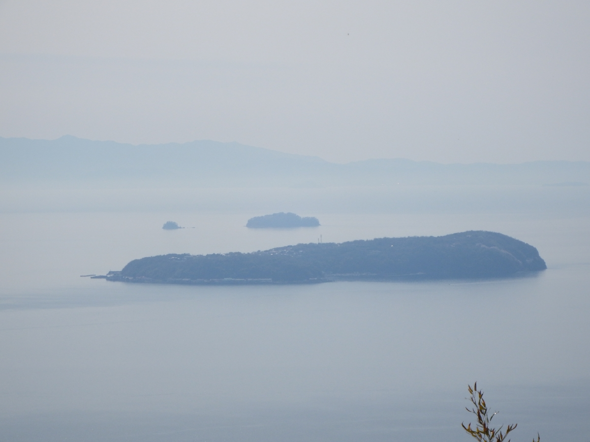 伊吹島を高屋神社本宮より臨む